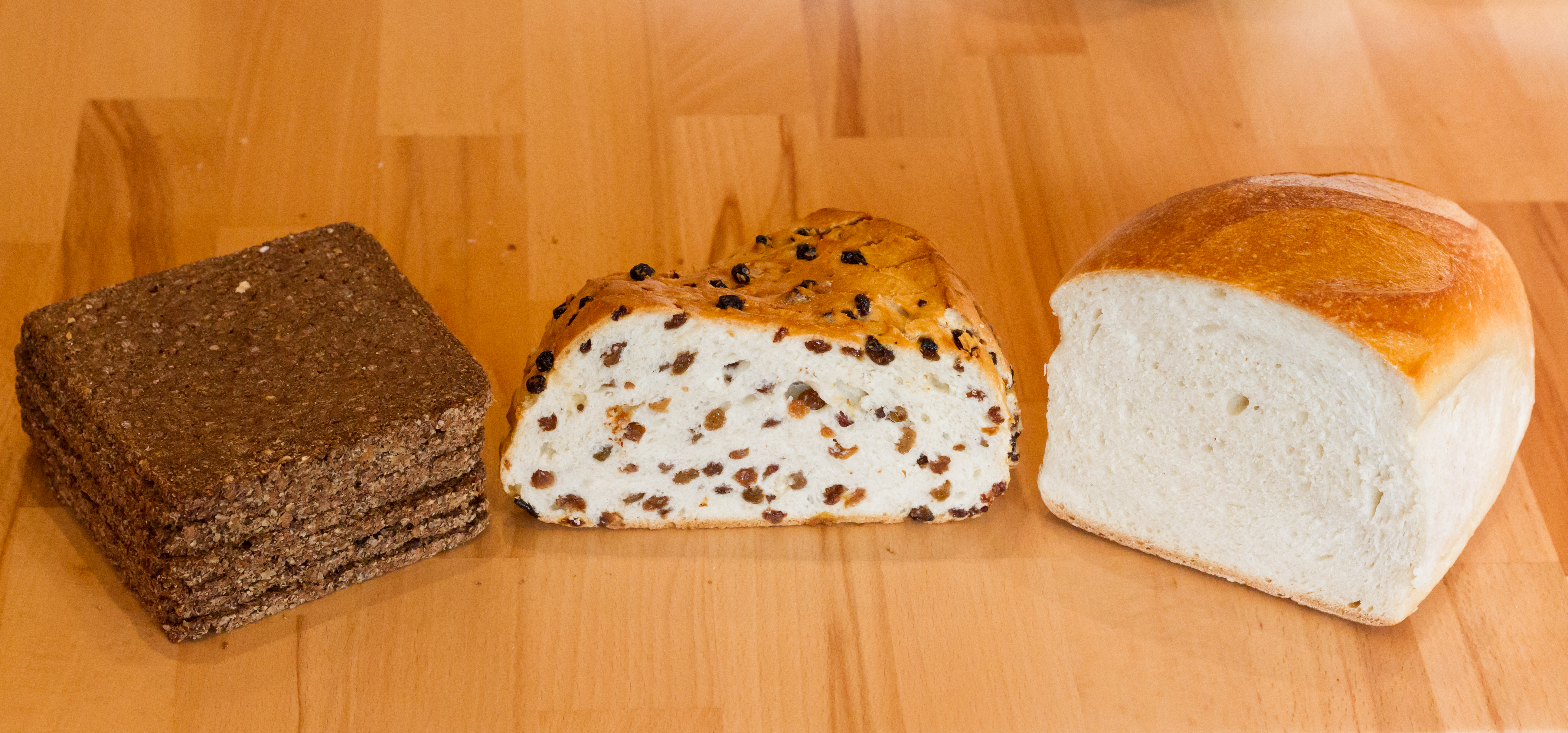 Schwarz-, Rosinenbrot, Ostfriesischer Stuten